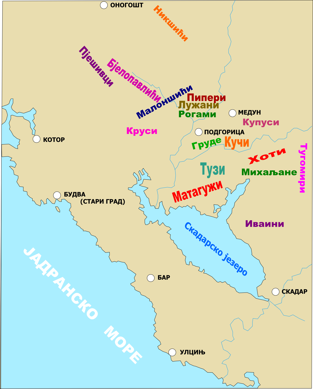 Dio katuna Gornje Zete, sredine XV vijeka.